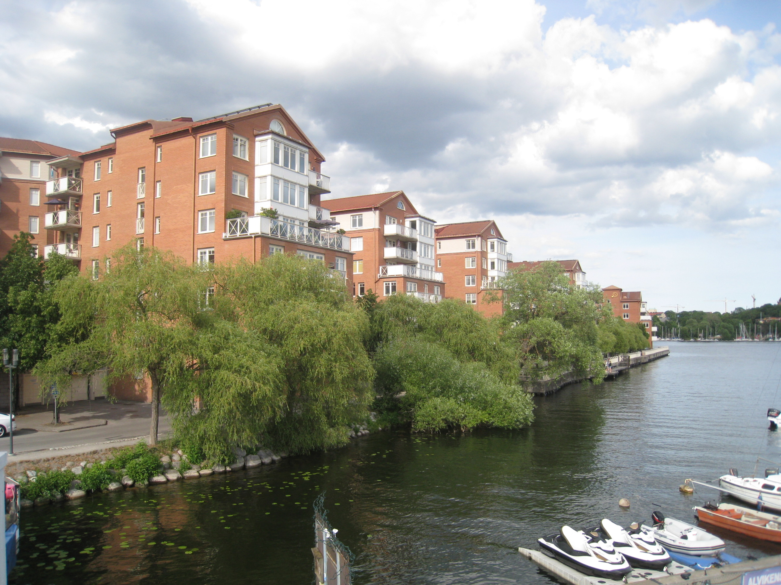 Tranebergs strand, vy från Sjöpaviljongen, Alvik, Bromma.